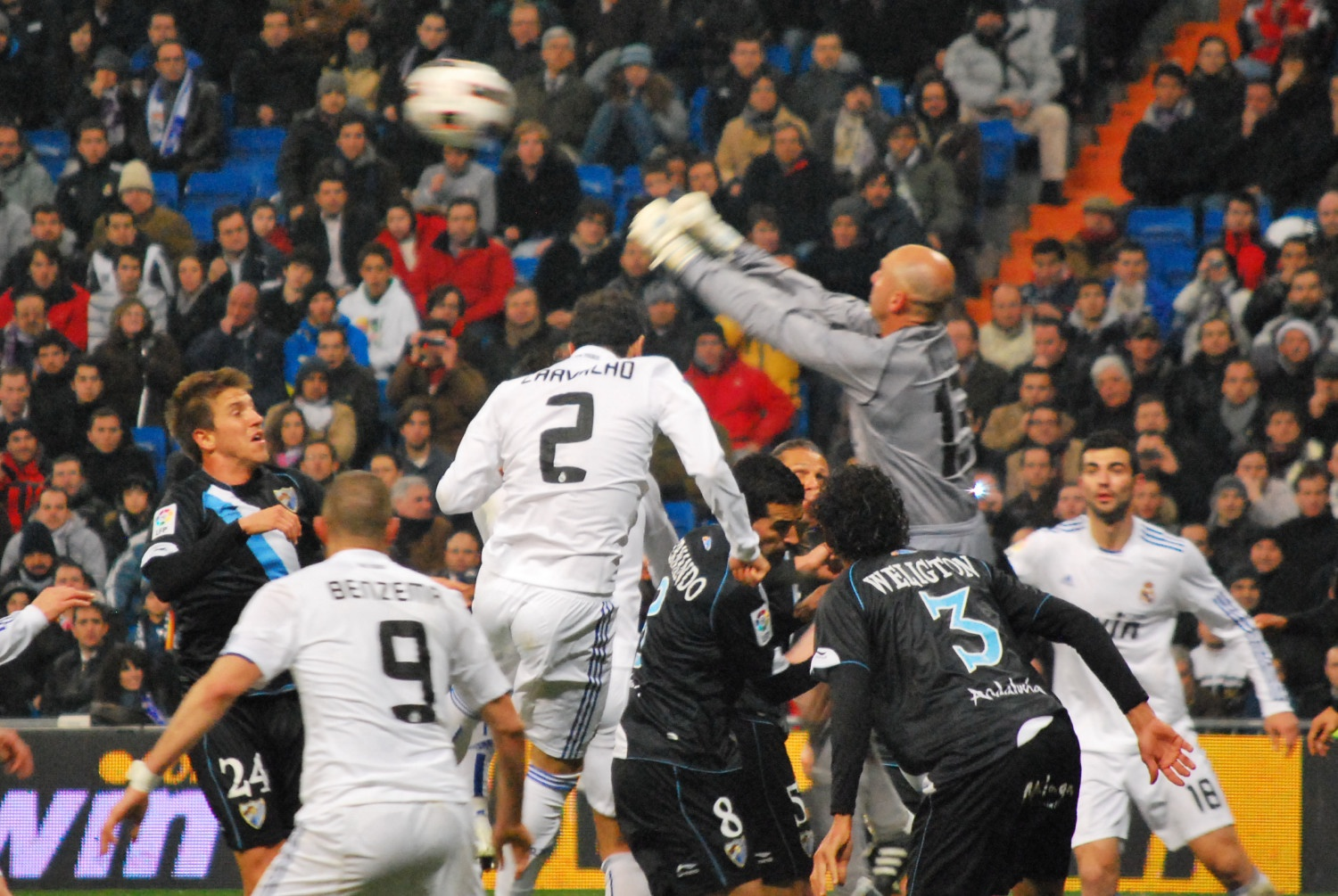 Despeje